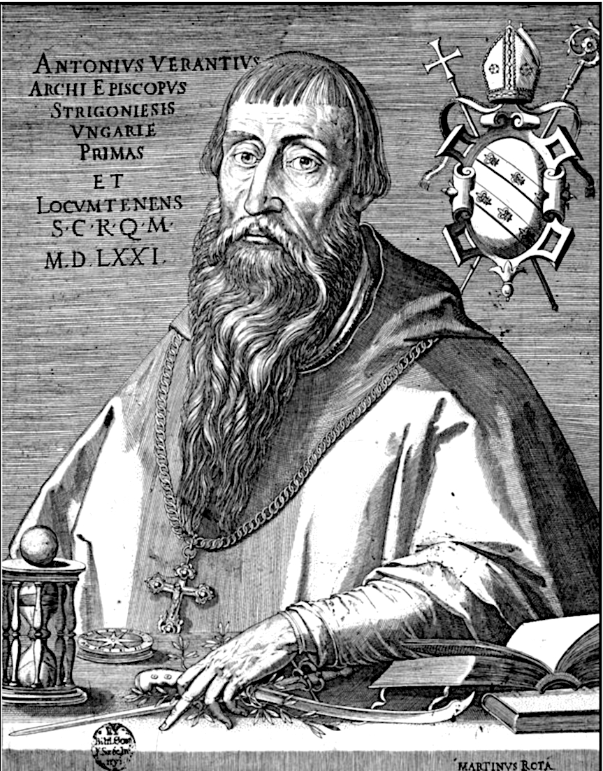 Martino Rota (1520 körül–1583:Verancsics Antal képmása, 1571.Budapest, Magyar Nemzeti Múzeum